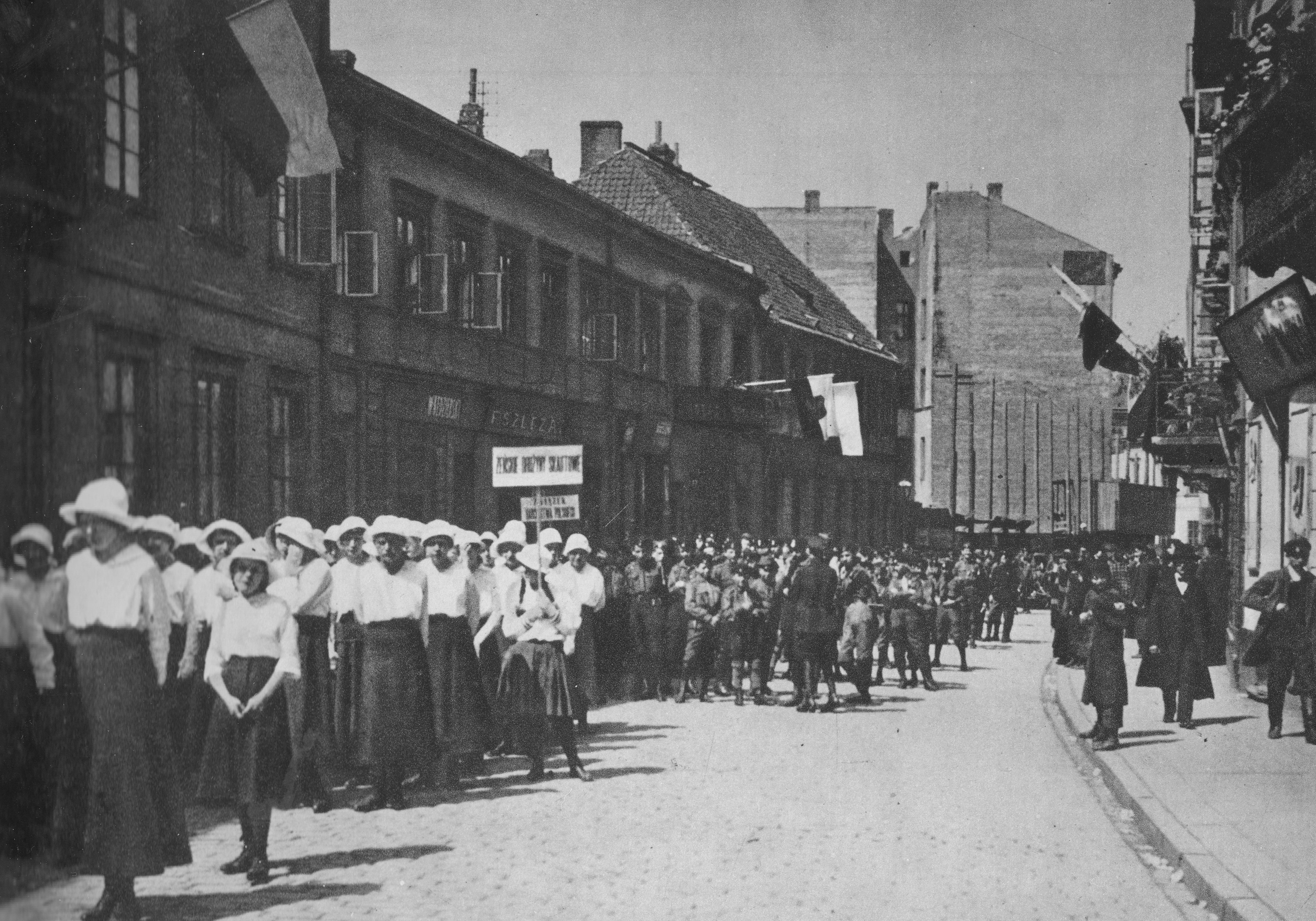 Ulica Podwale w Warszawie, przygotowania do pochodu z okazji rocznicy 3 maja